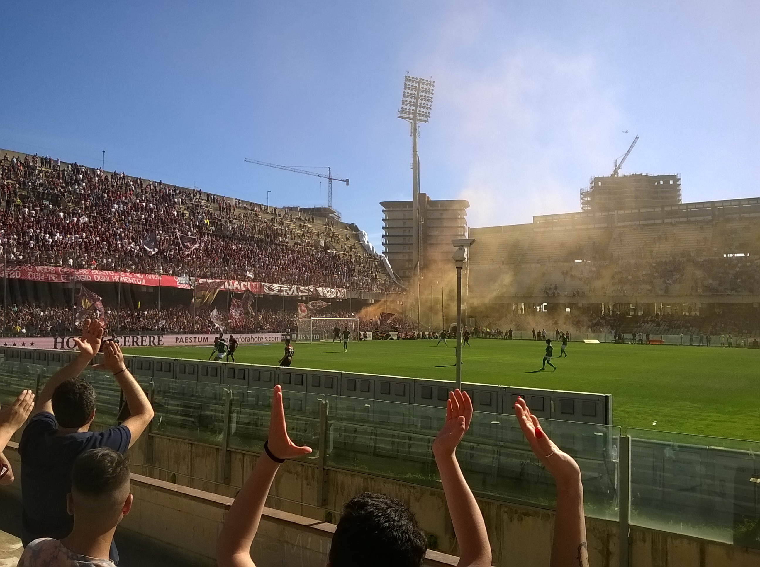 Il derby Salernitana-Avellino del campionato di Serie B 2016-17